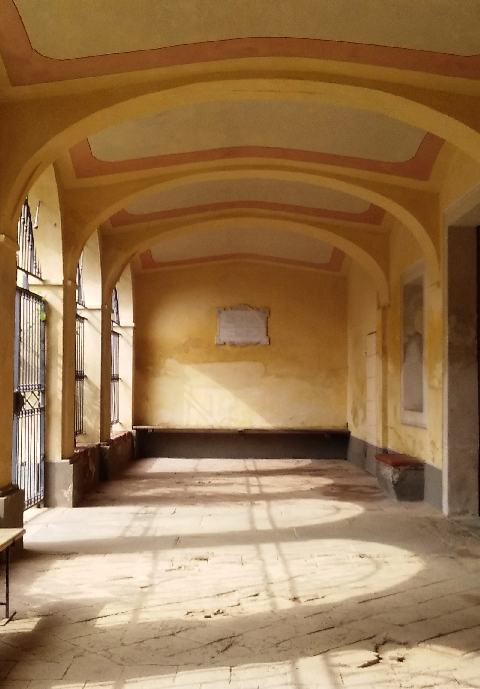 Santuario di Santa Cristina (Verzuolo) - il porticato anteriore